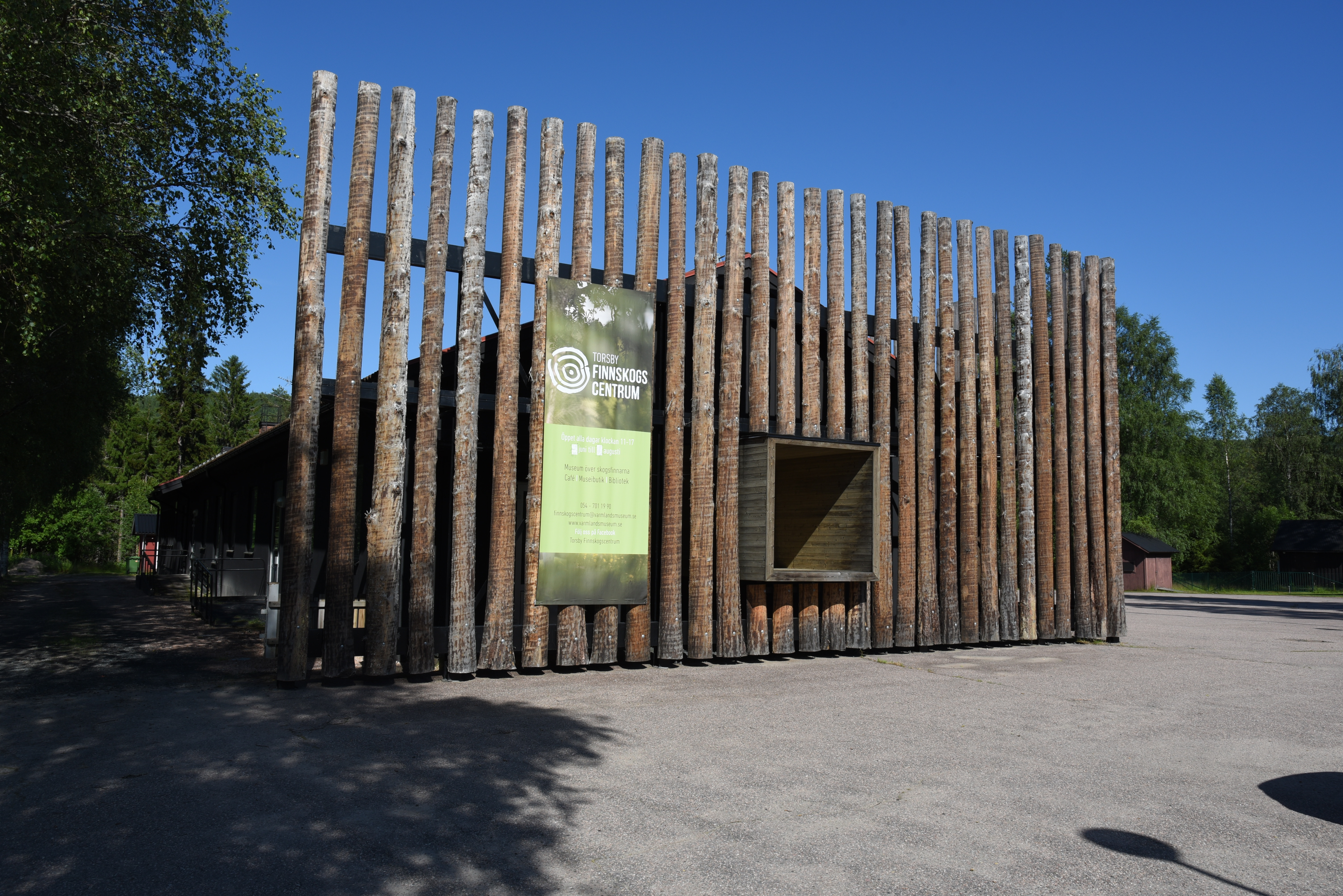 Torsby Finnskogscentrum i Lekvattnet i Torsby kommun.